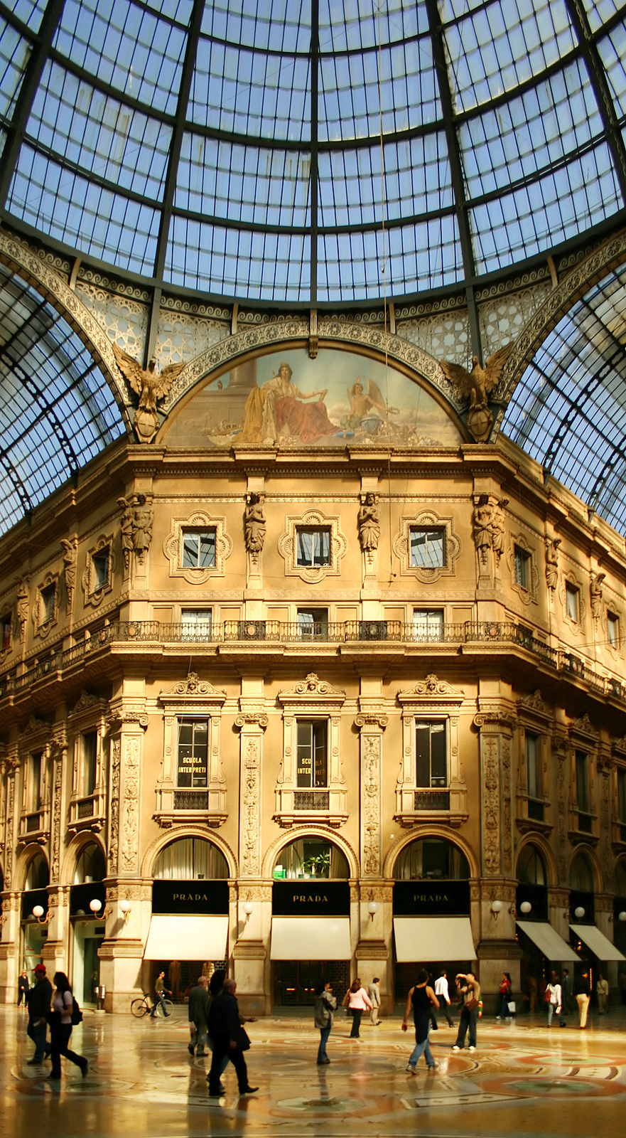 Einblick in die Viktor-Emanuel-Galerie, Mailand